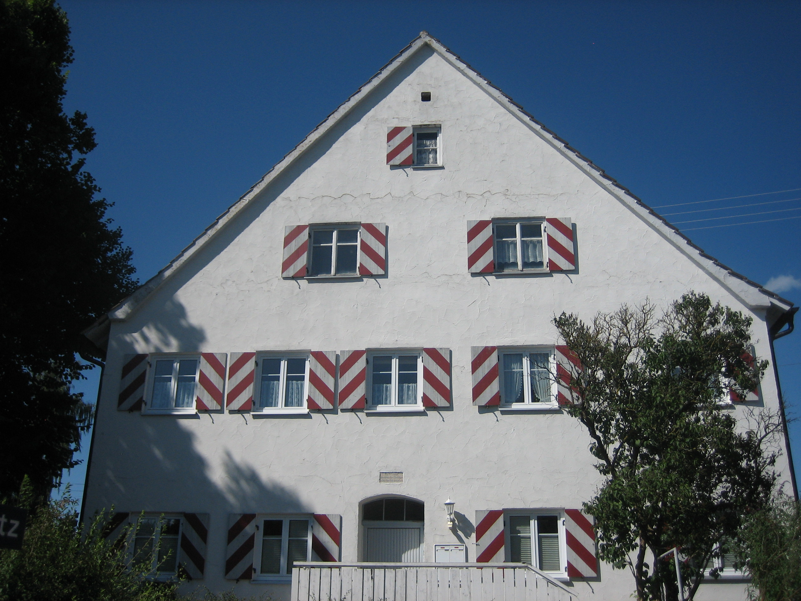 Ehem. Amtshaus derer von Rothenstein in Bad Grönenbach